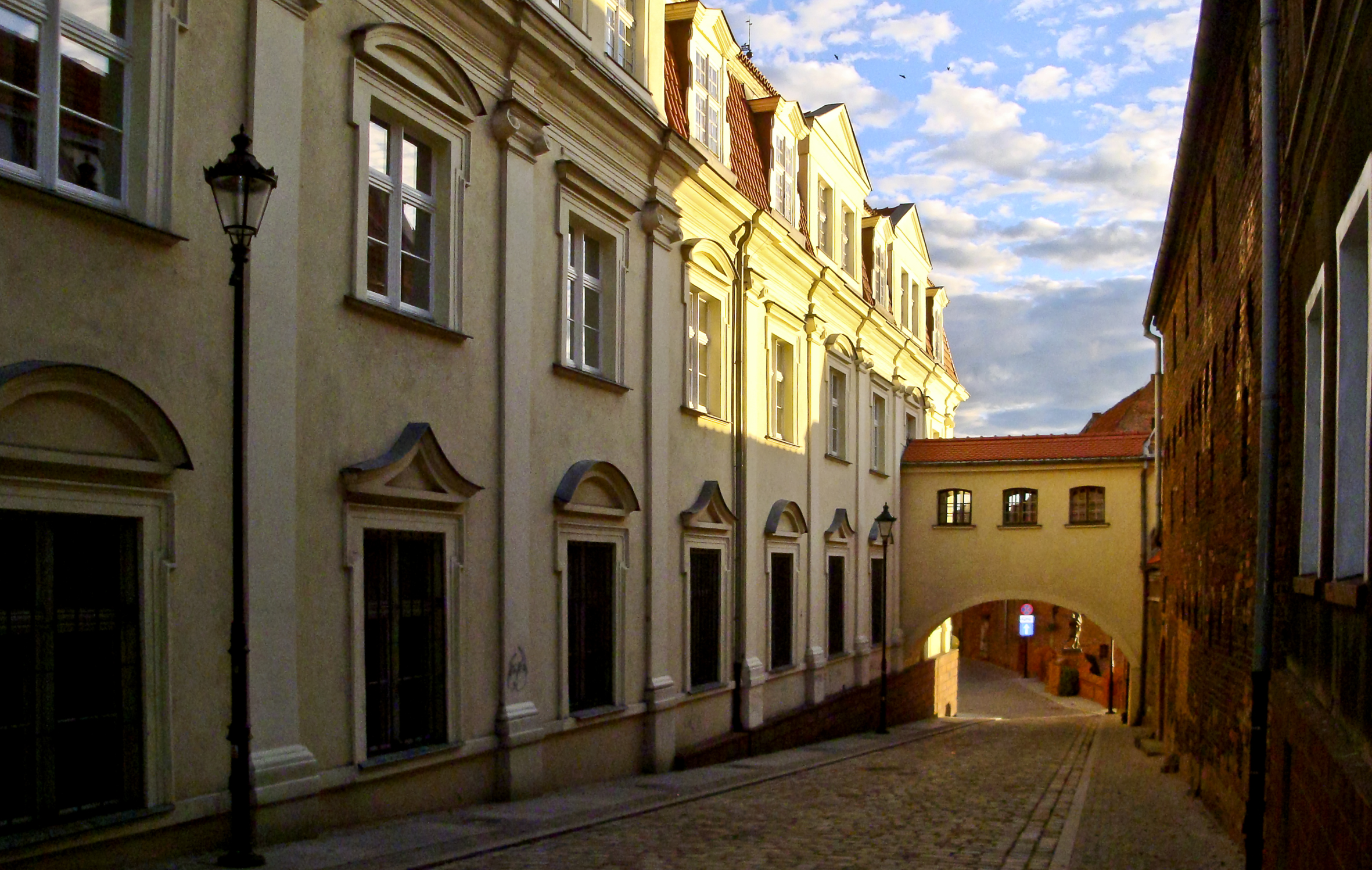 Grudziądz, kolegium jezuickie, ob. UM, 1647-1684, 1722-1725, XX Z zachodniego skrzydła ratusza można przejść do spichrza znajdującego się na przeciwnej stronie ulicy Spichrzowej krytym łącznikiem, nadwieszonym na półkolistej arkadzie pochodzącej z XVIII wieku.